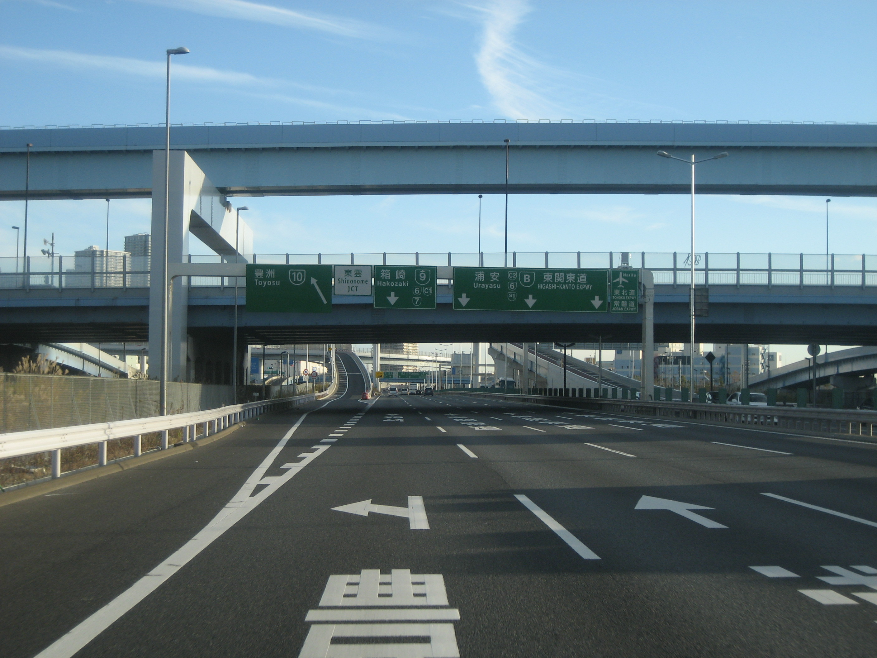 首都高速東雲JCT（湾岸線東行き方面を撮影）